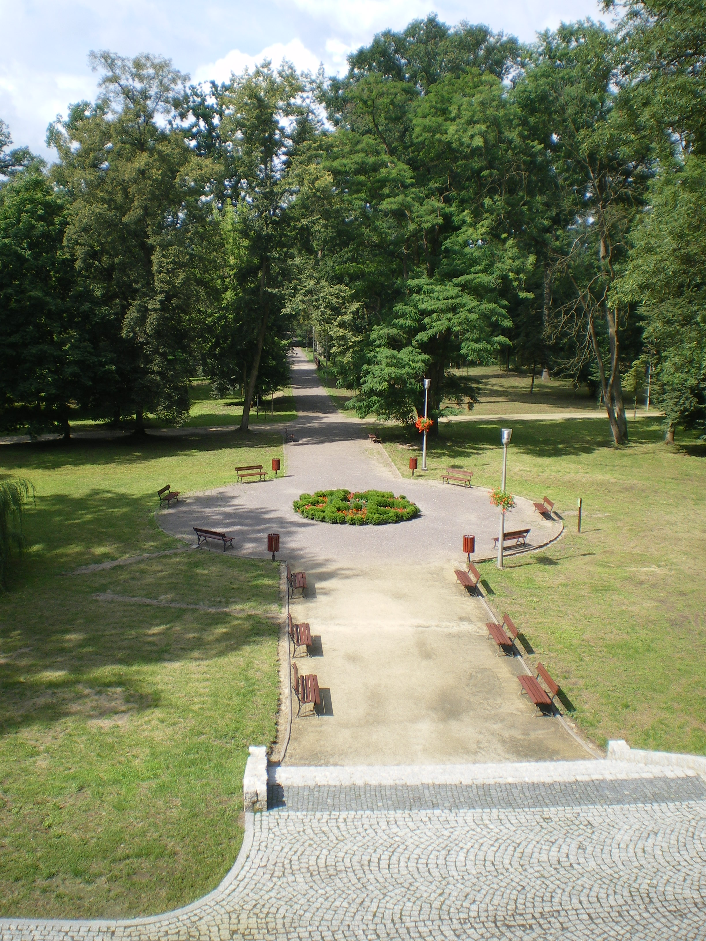 Uniejów, park przy zamku (z przyległym terenem starorzecza Warty), 2 poł. XIX